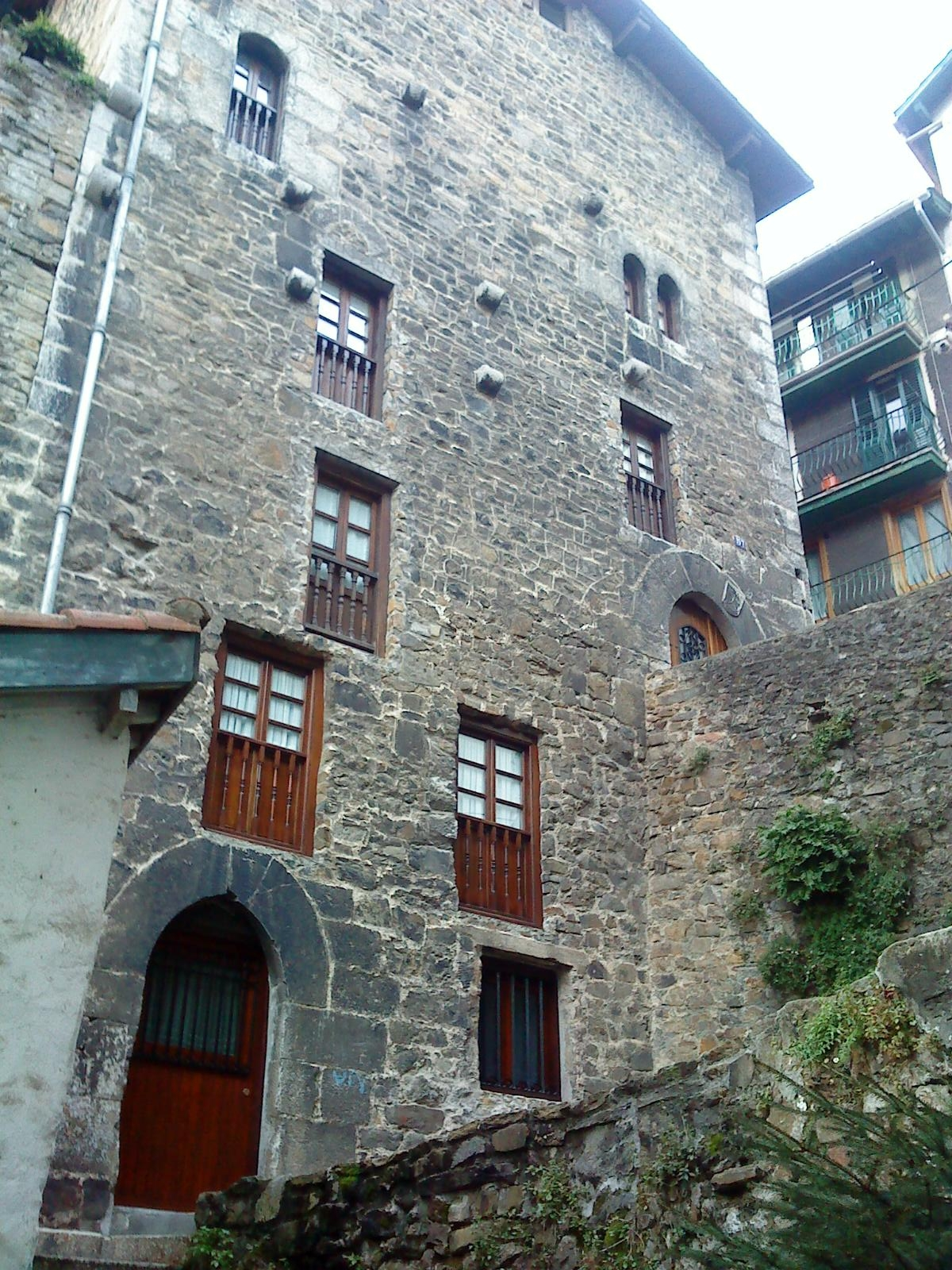 Casa torre Likona en Ondárroa, Vizcaya (País Vasco, España).